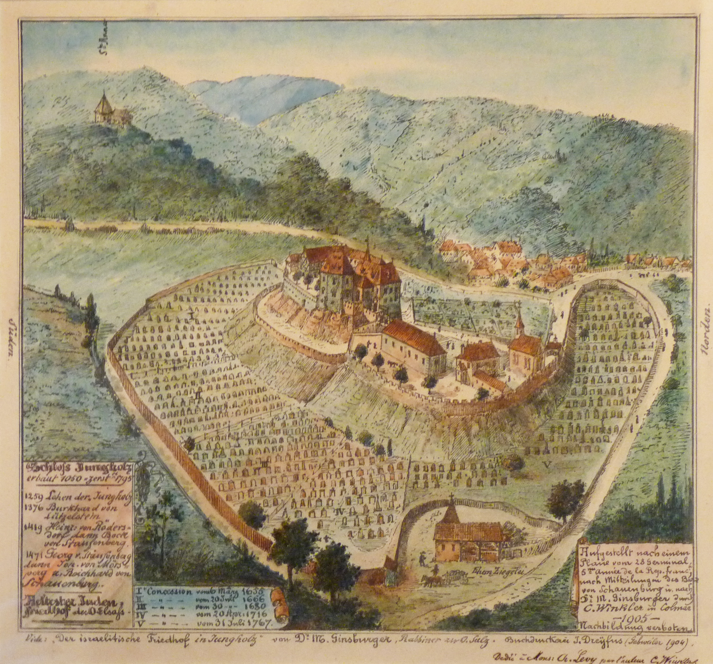 Le cimetière de Jungholtz, établi dans les douves du château. Papier imprimé reproduisant un dessin de C. Winckler [Charles Winkler ?], fait en 1905, Musée alsacien de Strasbourg.